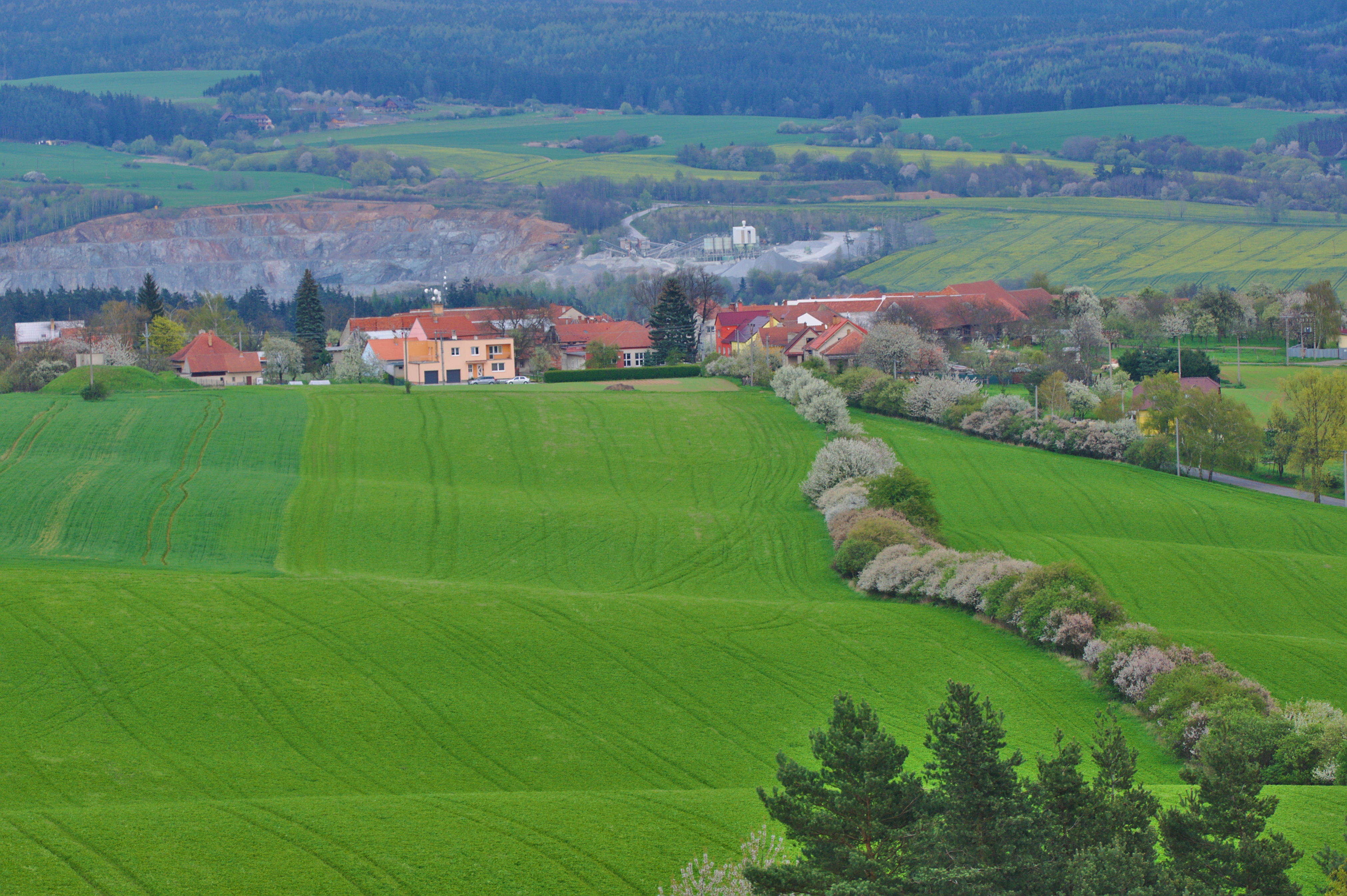 Pohled na obec z Malého Chlumu, Obora, okres Blansko